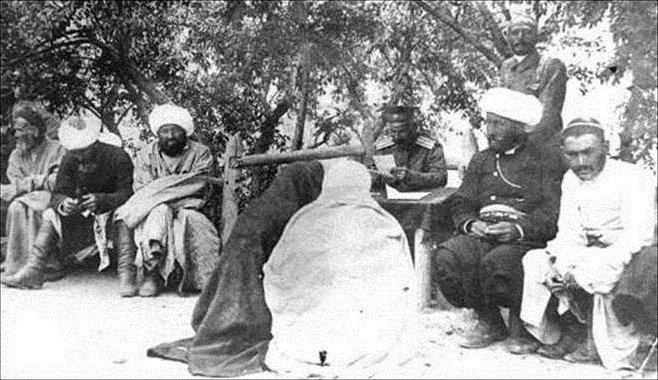 Подполковник Шпилько (сидит в погонах) решает вопросы населения. Хорог.